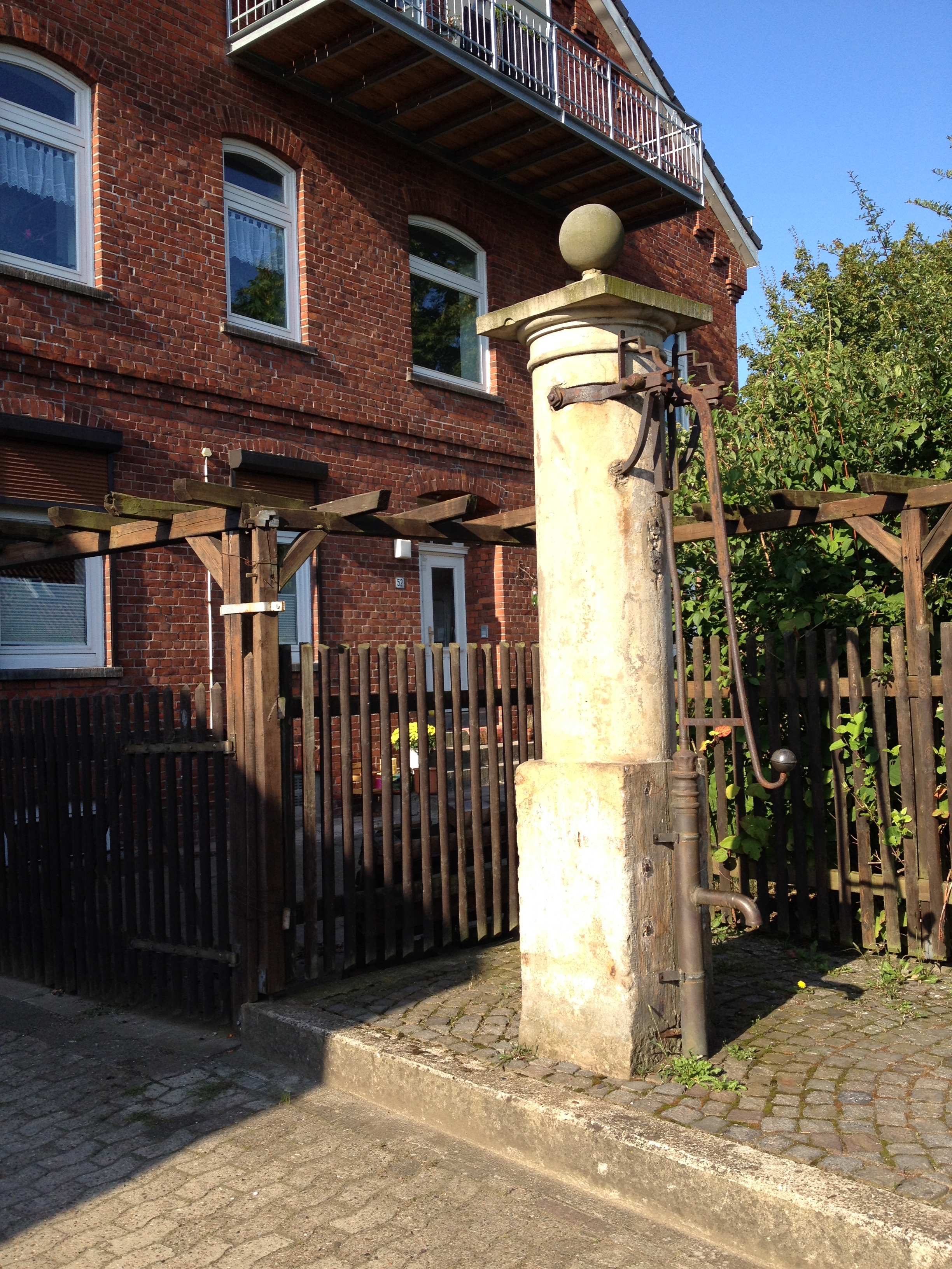 Brunnen in Bremen, Fröbelstraße 52Das abgebildete Objekt ist ein geschütztes Kulturdenkmal in der Freien Hansestadt Bremen, mit der Nr. 1995 beim Landesamt für Denkmalpflege registriert.